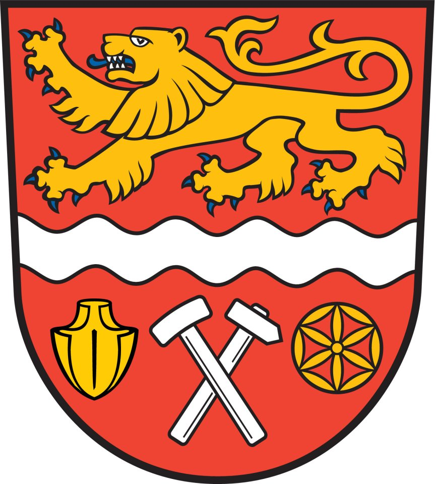 Das neue Wappen der Gemeinde Ilsede (Hauptsatzung Dezember 2015).